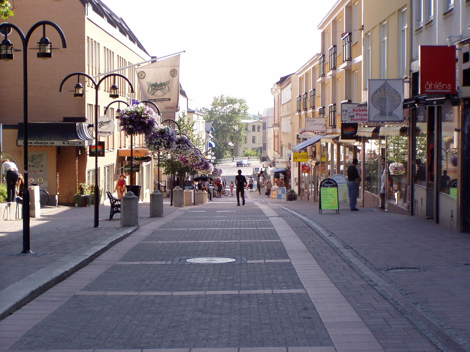 Storgatan in Härnösand, taken August 4. 2005